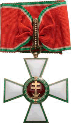 Magyar Érdemrend hadidíszítményes középkeresztje 1939